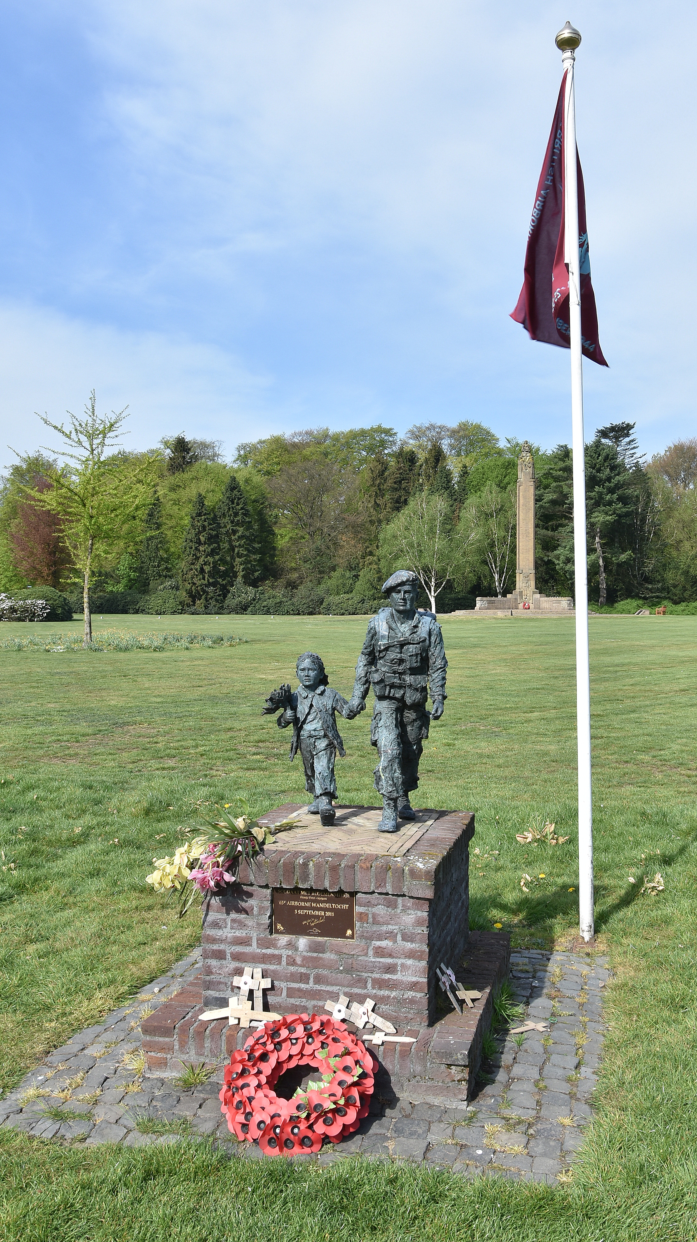 Soldaat met bloemenmeisje Oosterbeek 23-04-2019